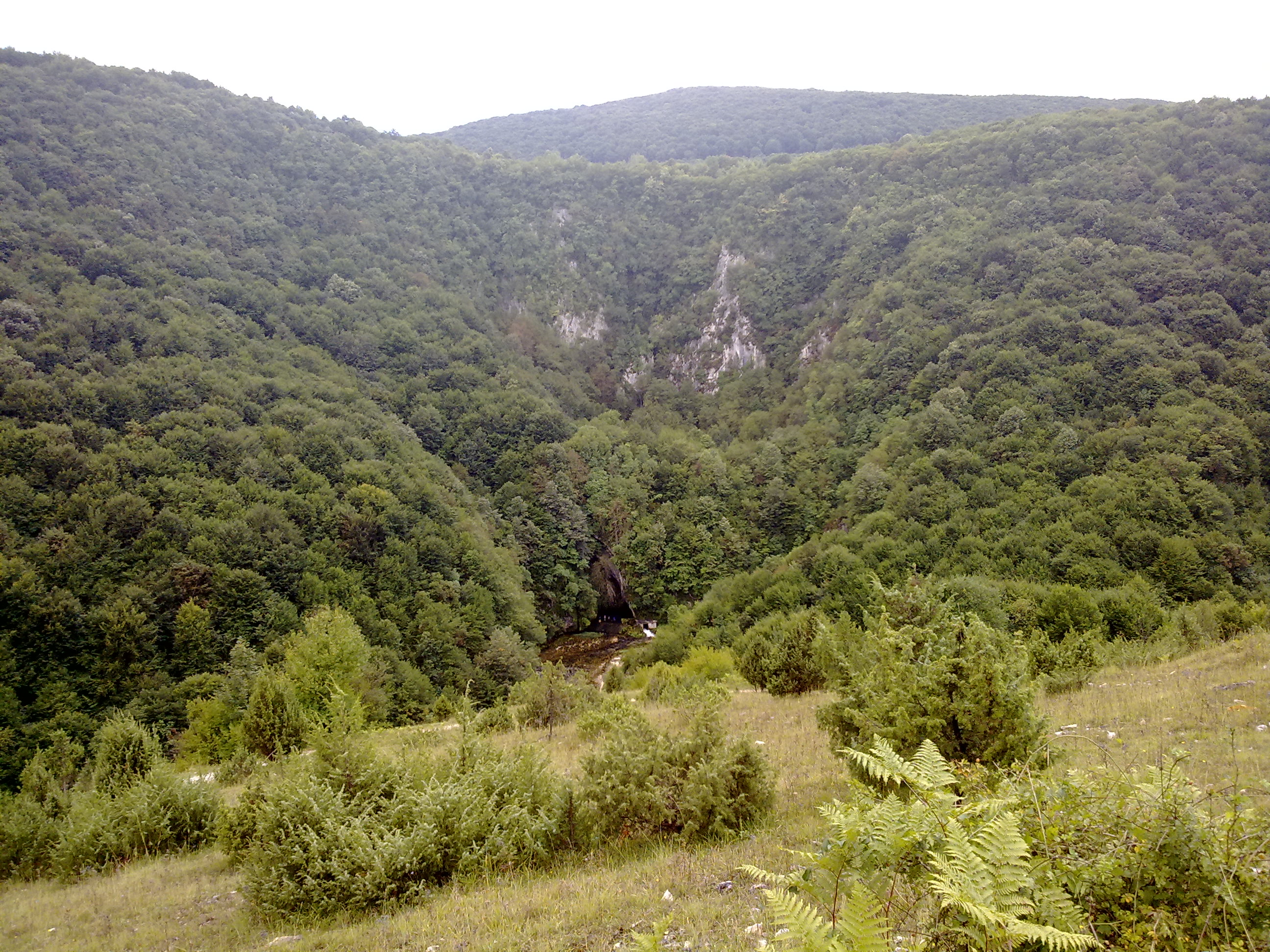 Dabarska pećina